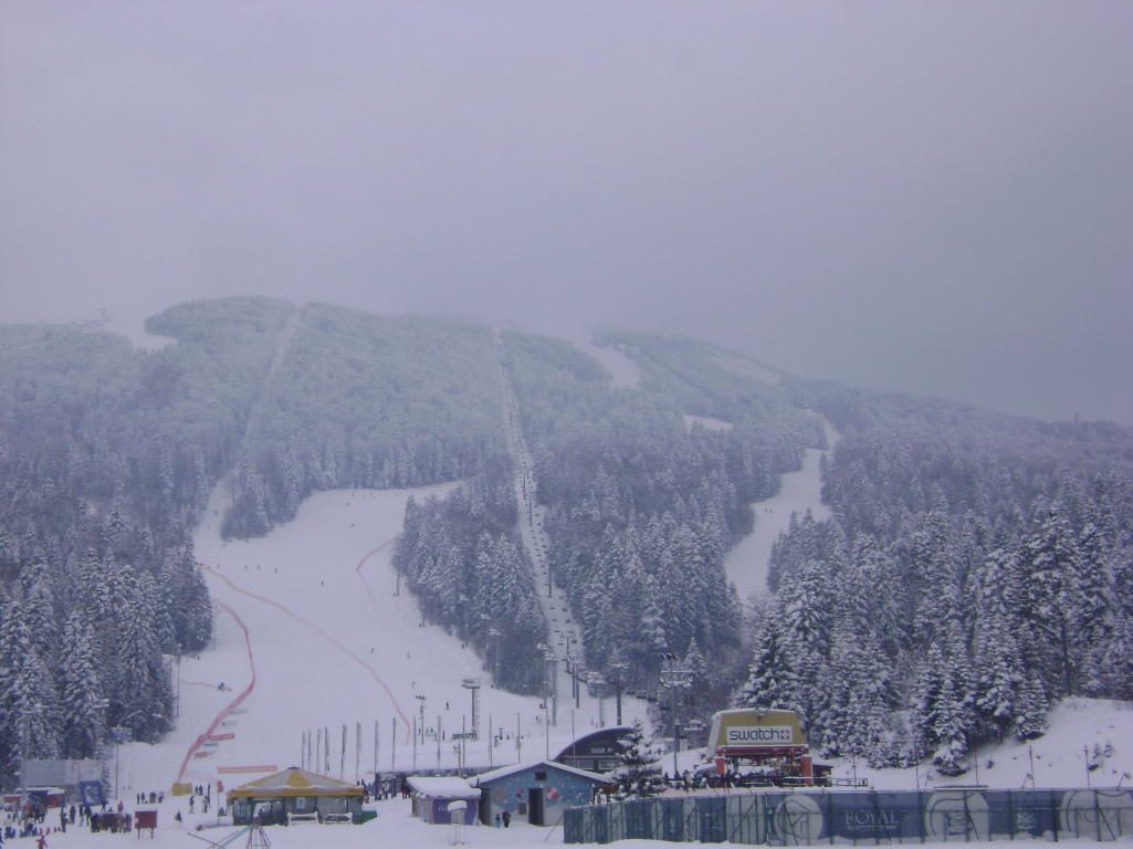 Bjelašnica2011.